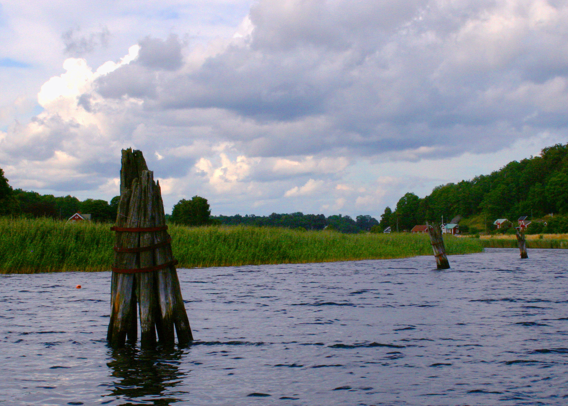 Dykdalber i Järnavik, Blekinge